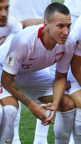 Piłkarz Jacek Góralski (6) przed meczem z Japonią, mundial 2018.